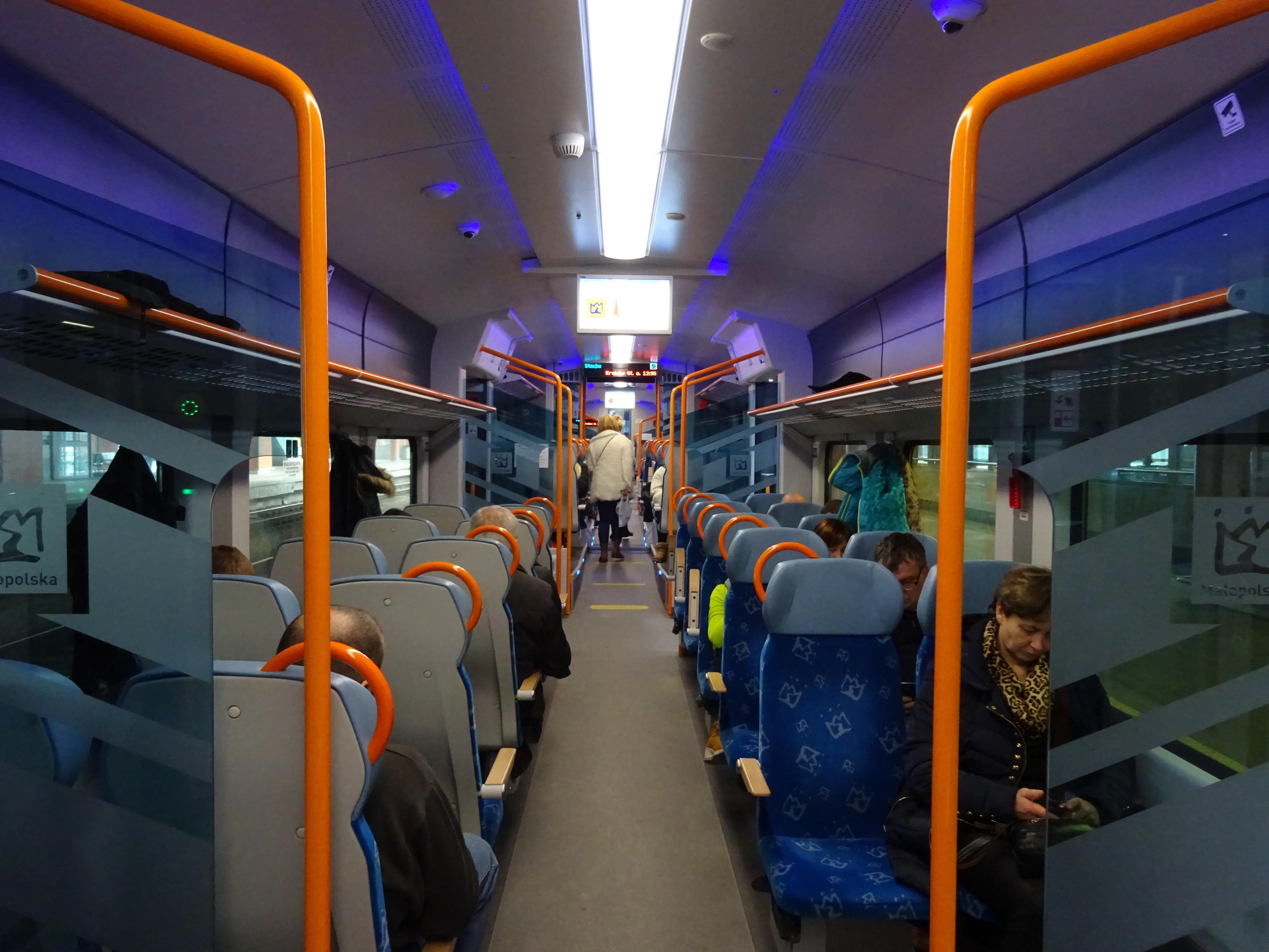 Wnętrze Małopolskiej jednostki EZT Pesa Acatus Plus. Kraków, Dworzec Główny.